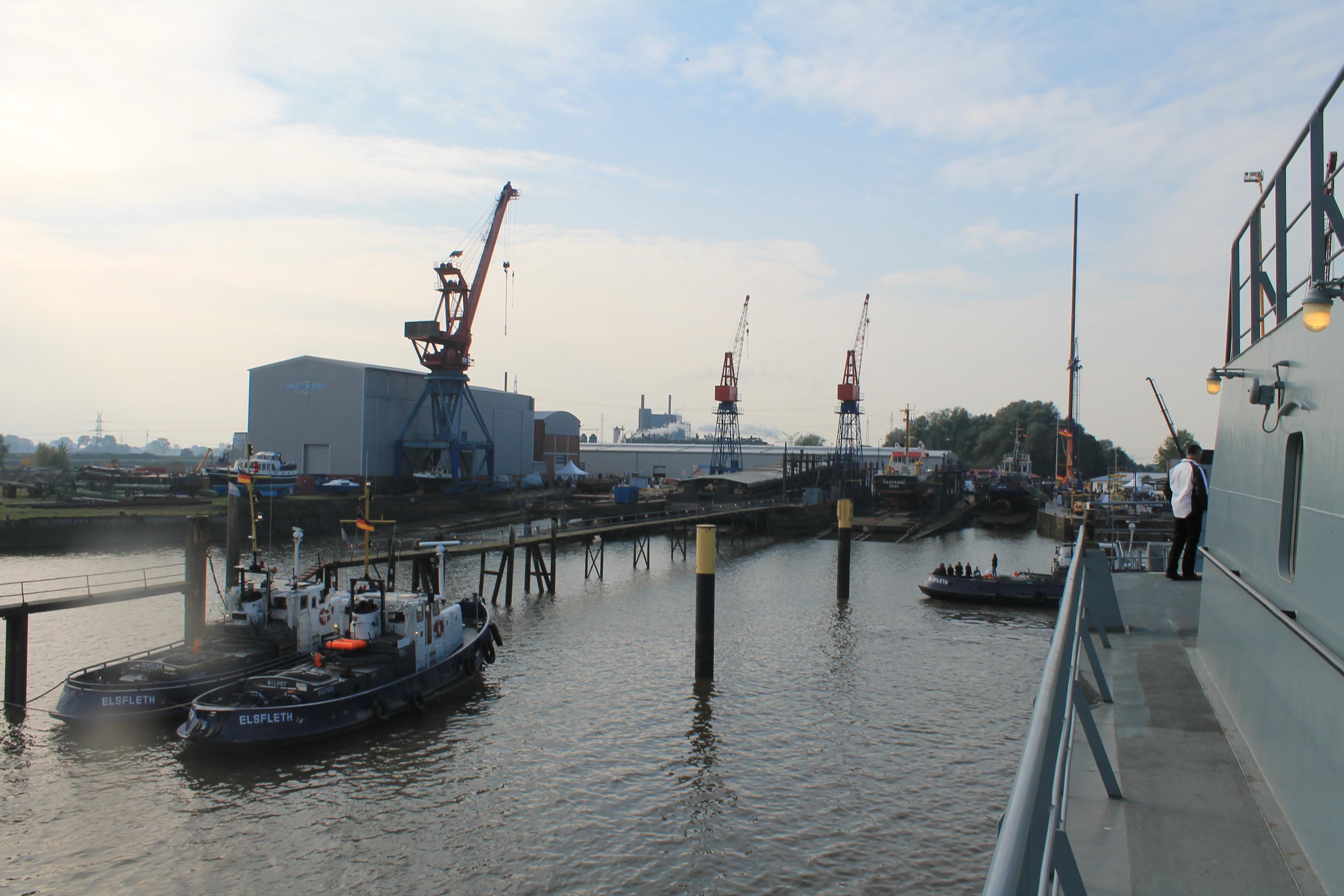 Elsflether Werft Werftrundgang 3, Neue Hallen und Slipanlagen von der Wasserseite